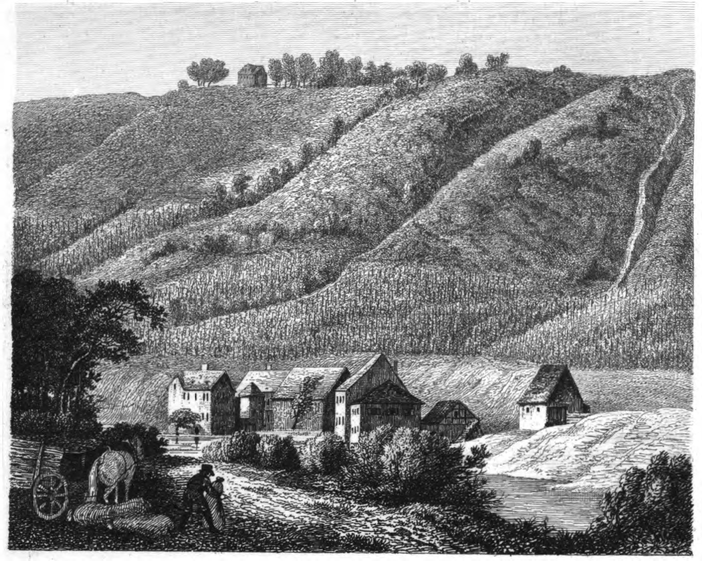 Stahlstich mit Ansicht der sogenannten Saalhäuser bei Bad Kösen (an der Saale Richtung Naumburg)